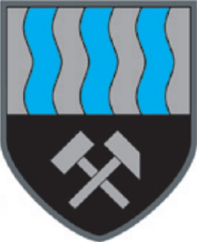 Wappen der Gemeinde Pöfling-Brunn